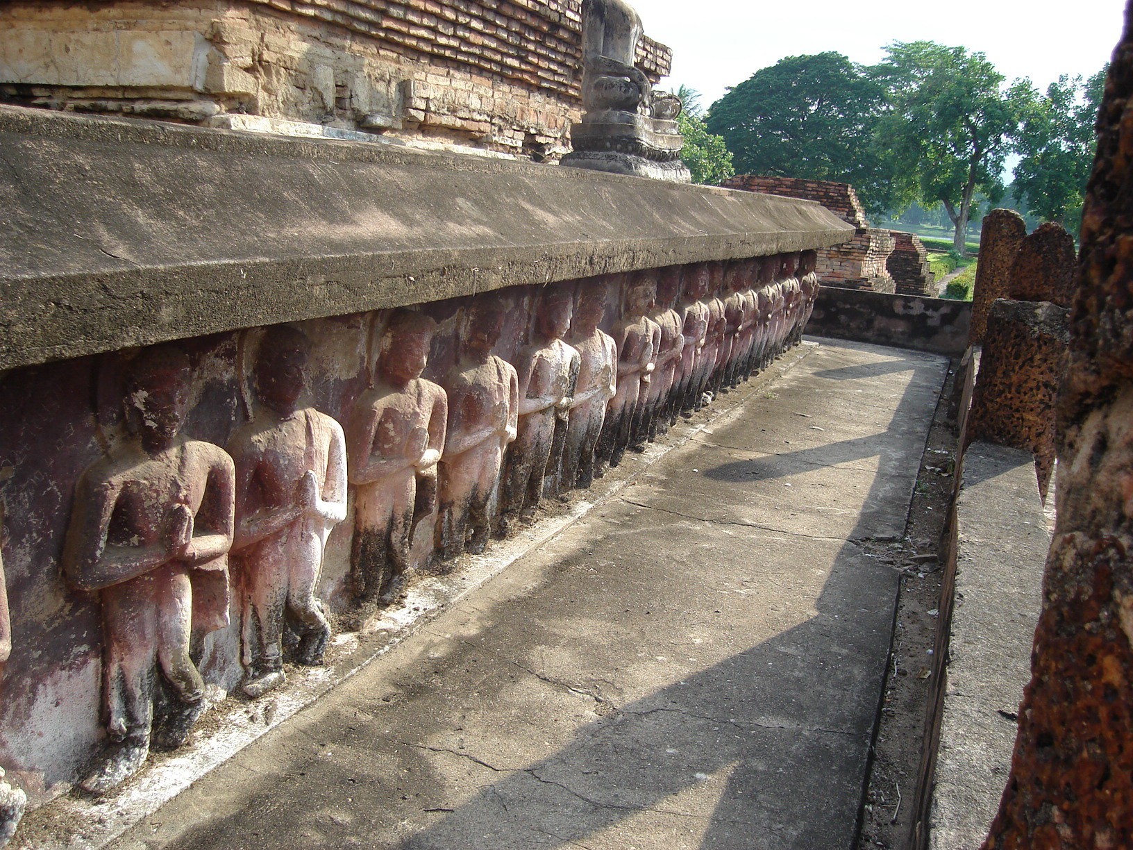 วัดมหาธาตุ อุทยานประวัติศาสตร์สุโขทัย Wat Mahathat .Sukhothai ,Thailand.2006